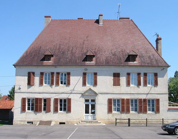 École d'Essertenne et cecey